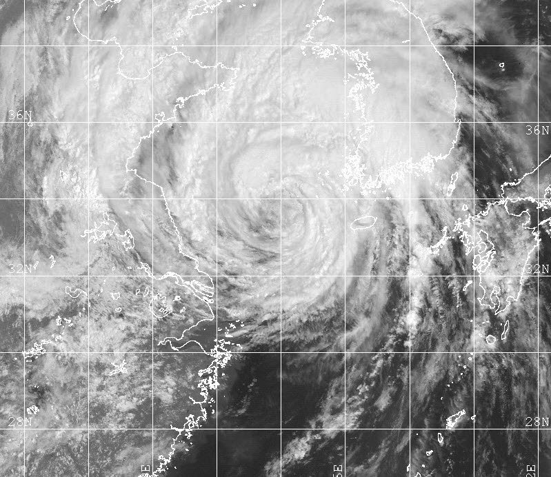 Typhoon Prapiroon (2000)